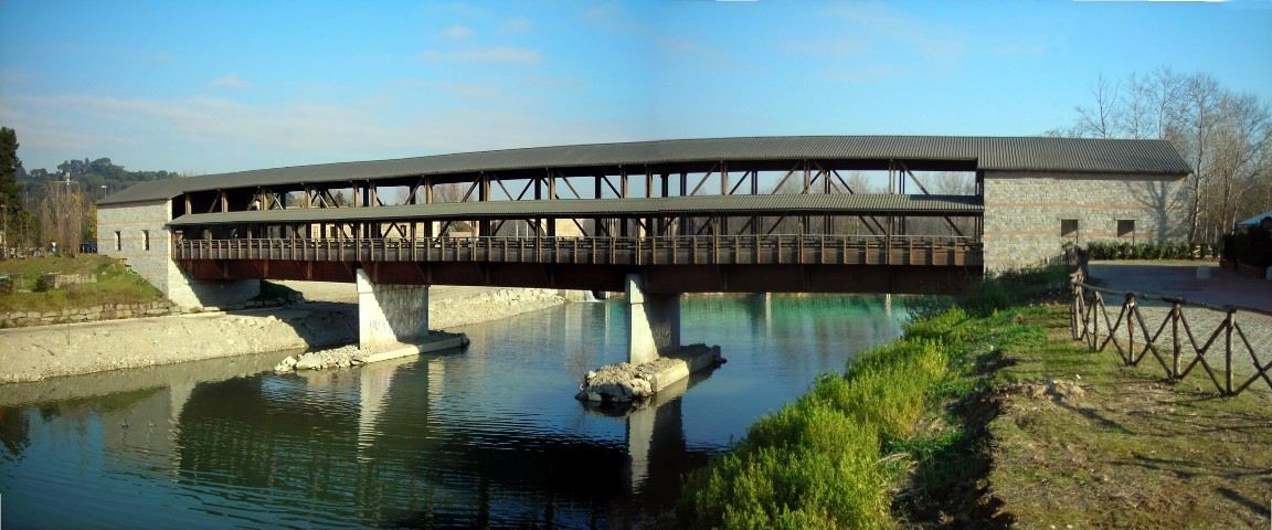 new Ponte Vecchio bridge in Ponte San Giovanni, Perugia, Umbria, Italy